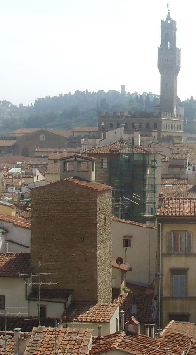 Torre dei Visdomini and Palazzo Vecchio's Tower